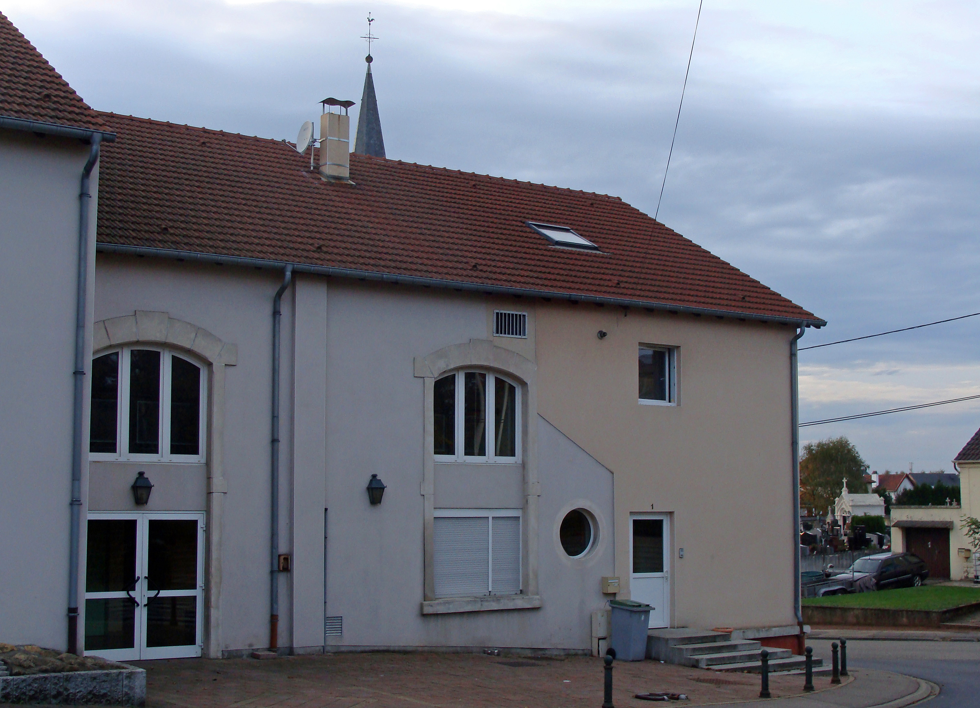 Ancien Foyer Catholique de L'Hôpital (Moselle) le 25 octobre 2013.